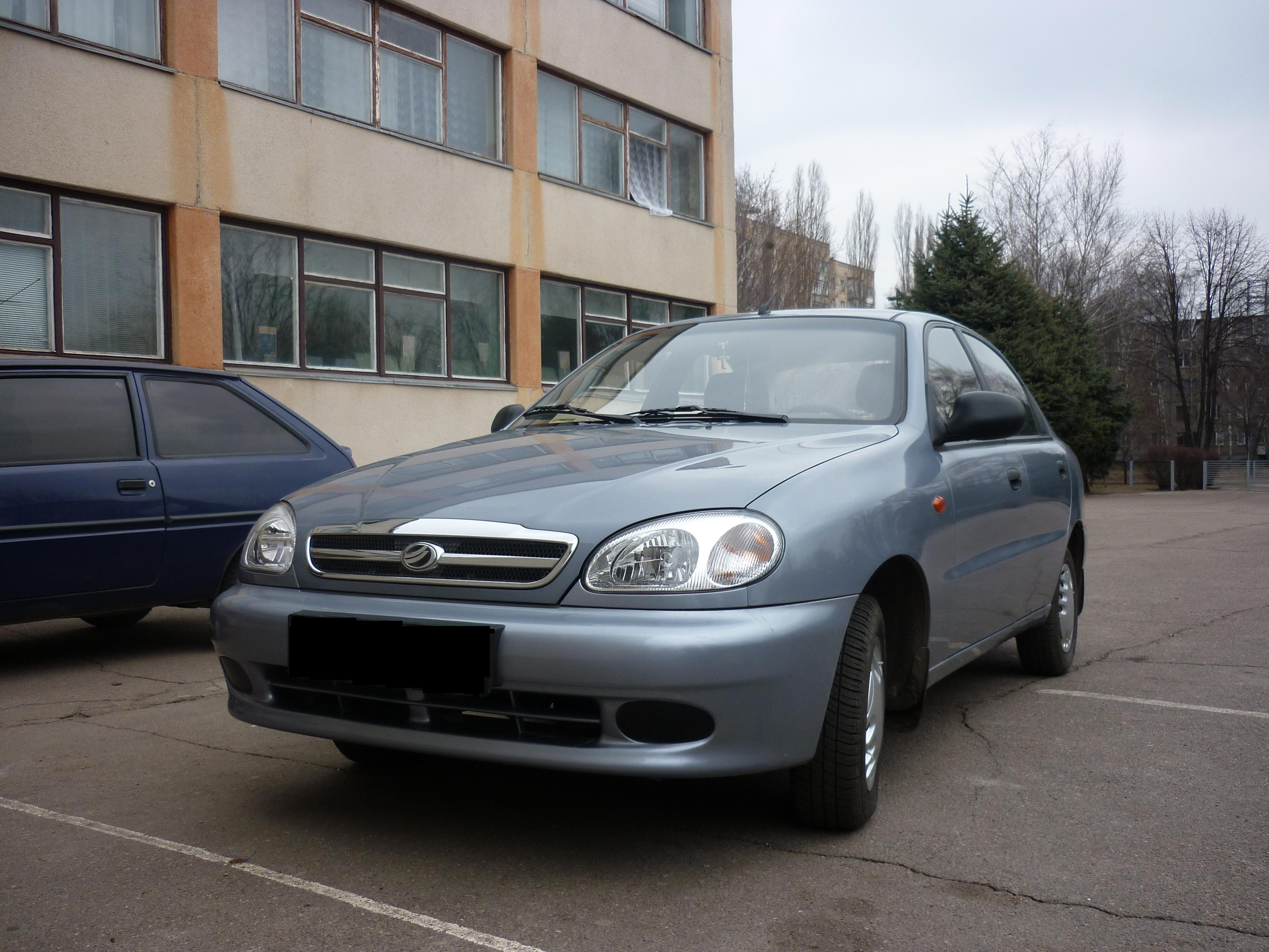 Автомобіль ЗАЗ Сенс 2011 року випуску